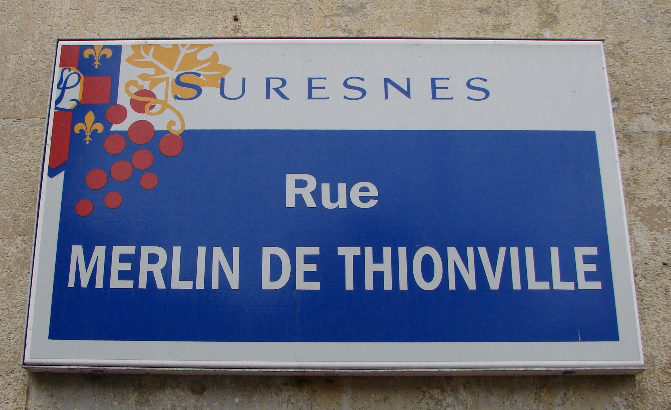 Plaque de la Rue Merlin de Thionvelle à Suresnes